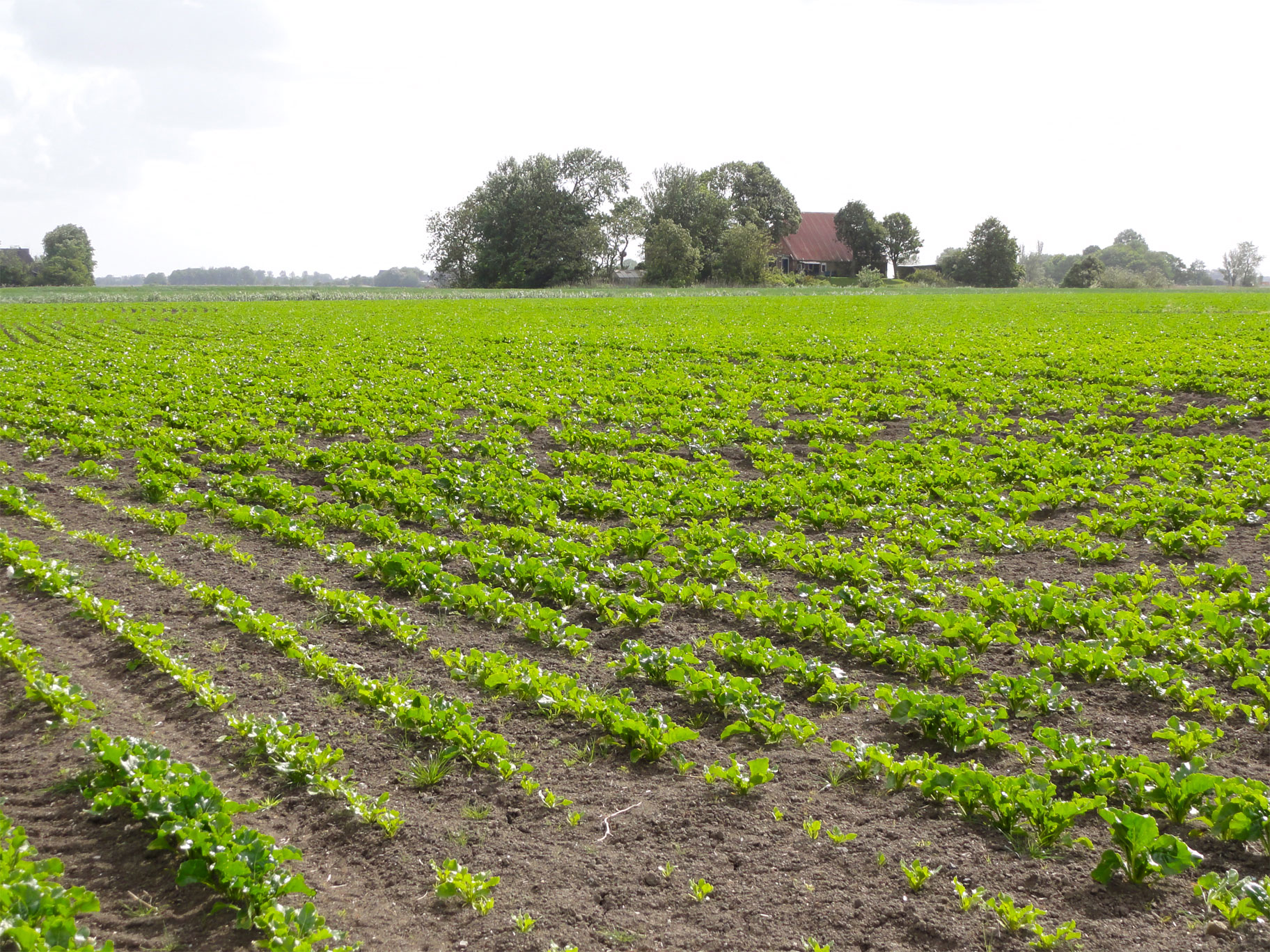 Huisterp bij Kienstraloane nabij Blija